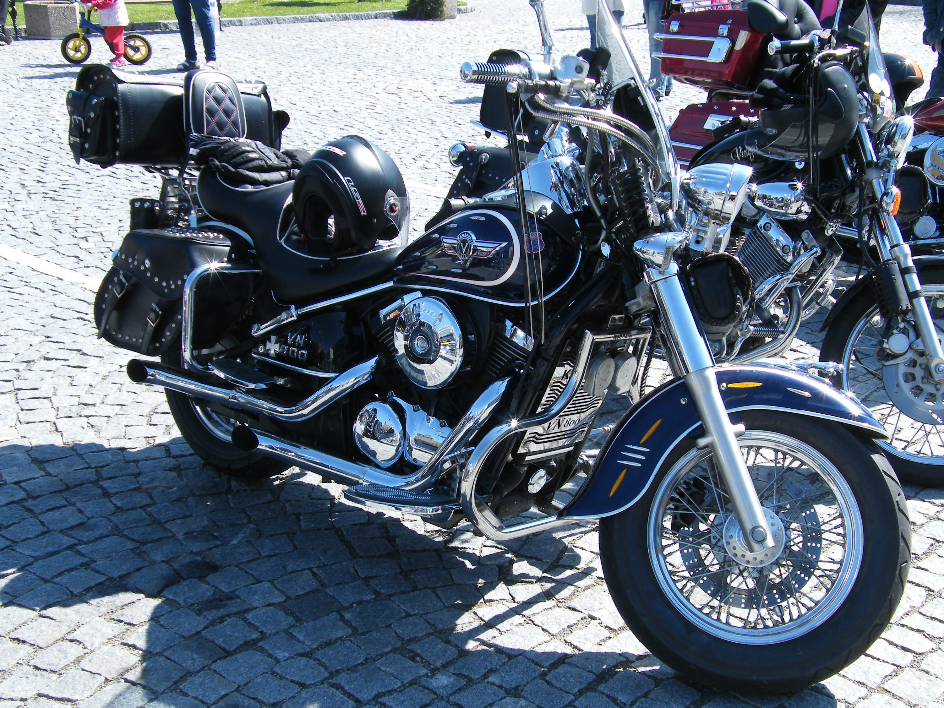 Kawasaki VN 800